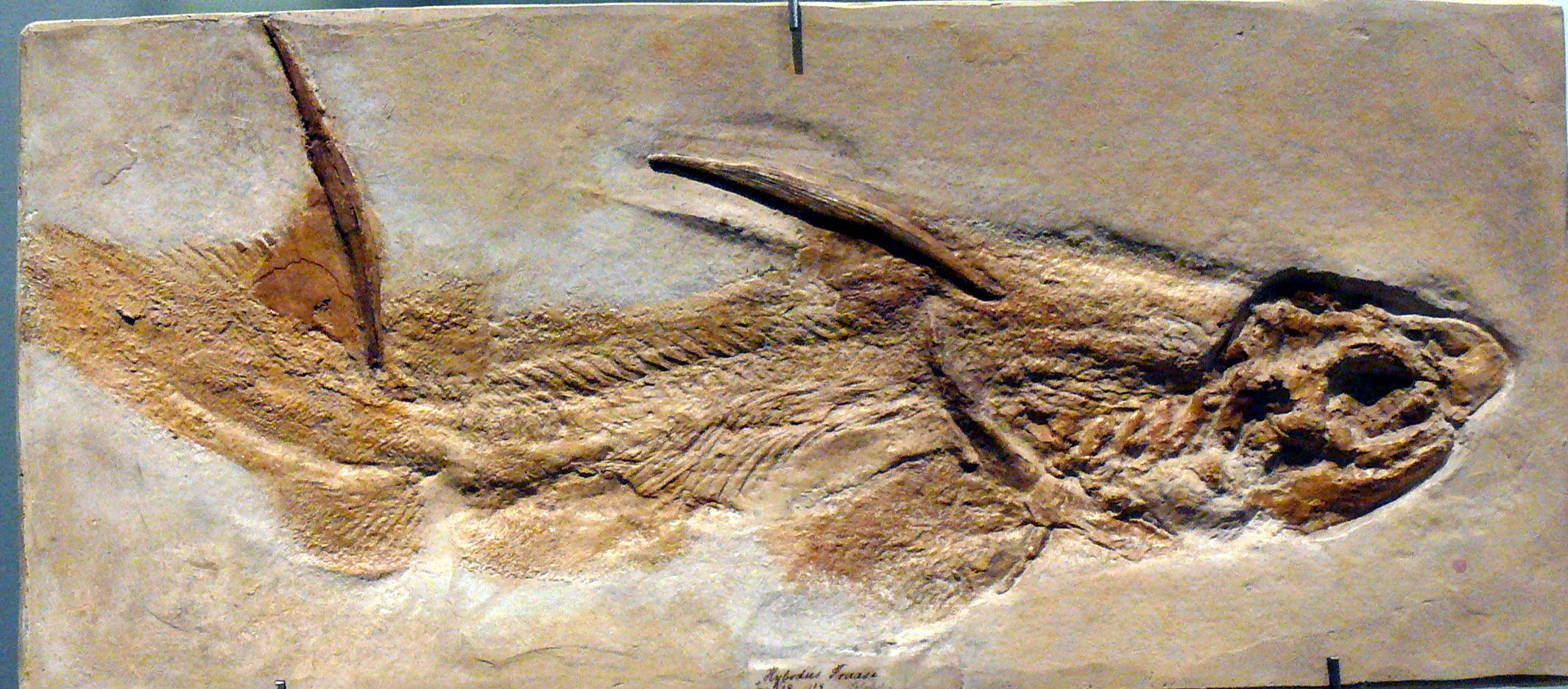 Hybodus fraasi from Eichstätt, Germany